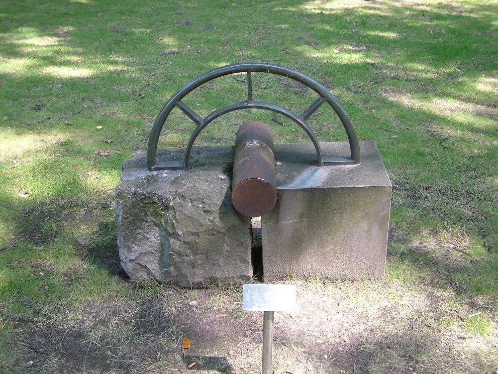 In het Stadswandelpark in Eindhoven. Kunstwerk: Parkbeeld, Kunstenaar: Henck van Dijck, 1989